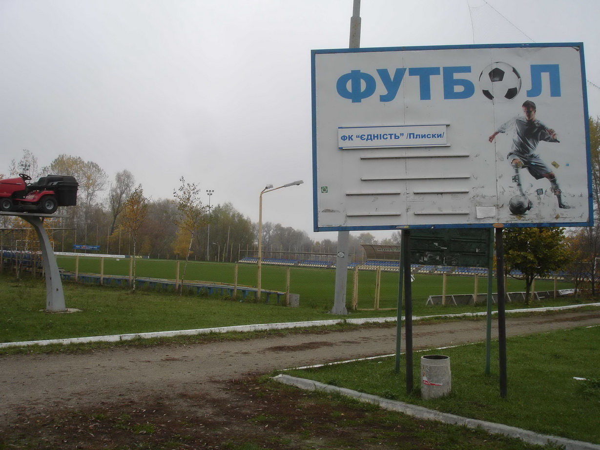 Стадіон "Єдність" у с. Плисках